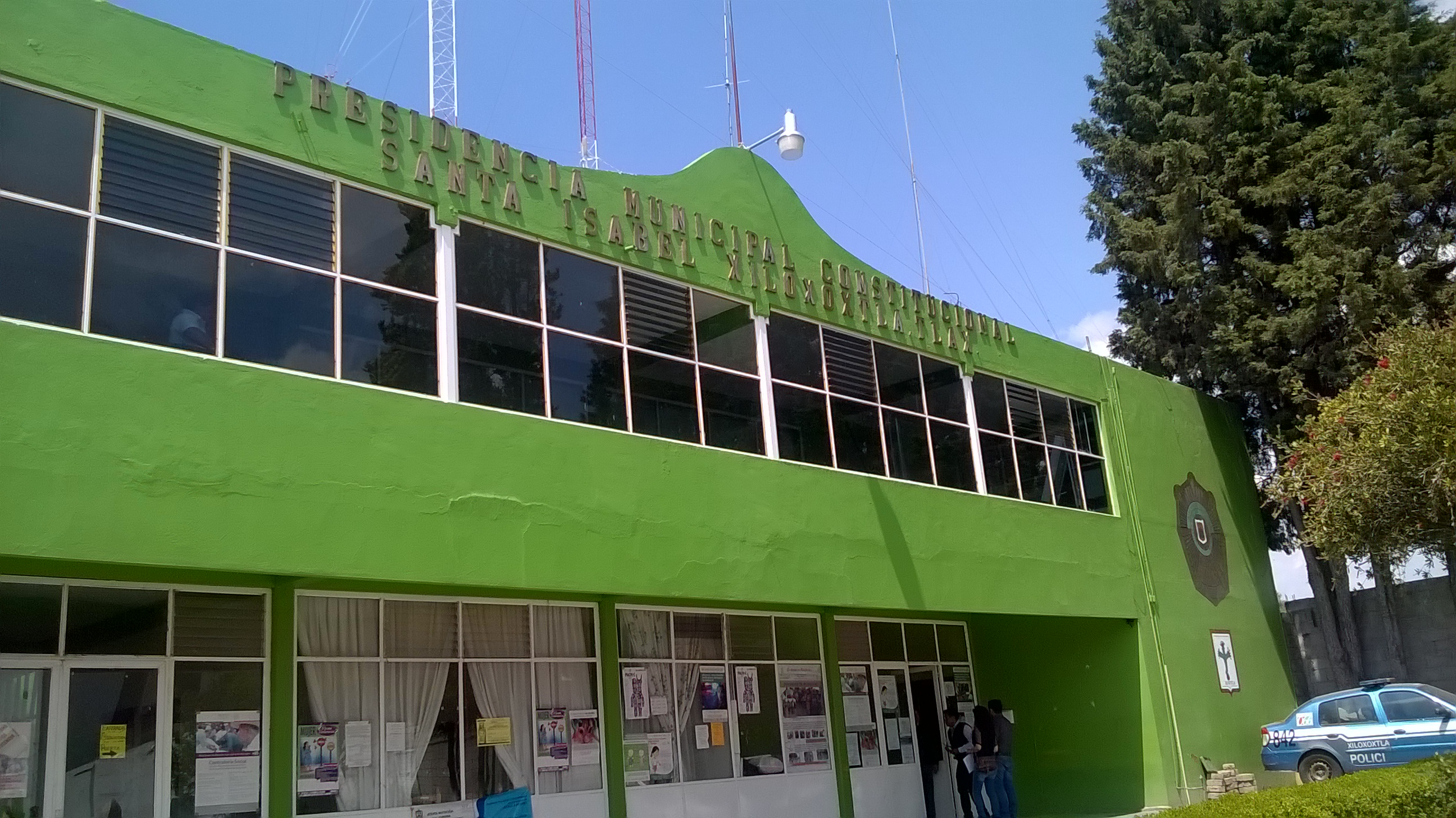 Presidencia Municipal de Xiloxoxtla, Tlaxcala